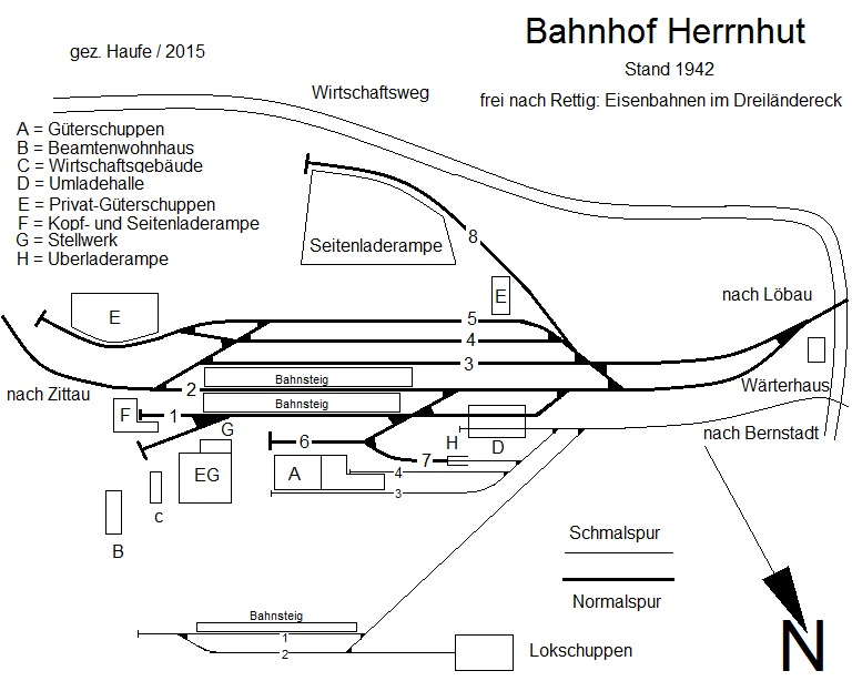 Gleisplan des Bahnhofes Herrnhut aus dem Jahr 1942